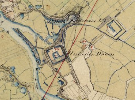 Omgeving Huis Den Doorn en Overijsselse Vecht met Zijlkolk